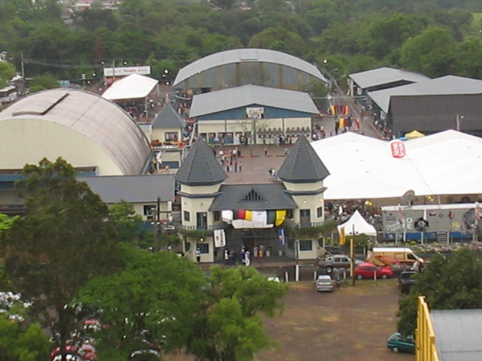 Vista do parque de Eventos Almiro Grings - Parque da Oktoberfest de Igrejinha